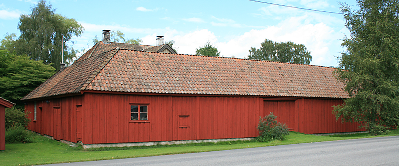 Uthus fra 1700-tallet, Porsgrunn bymuseum.